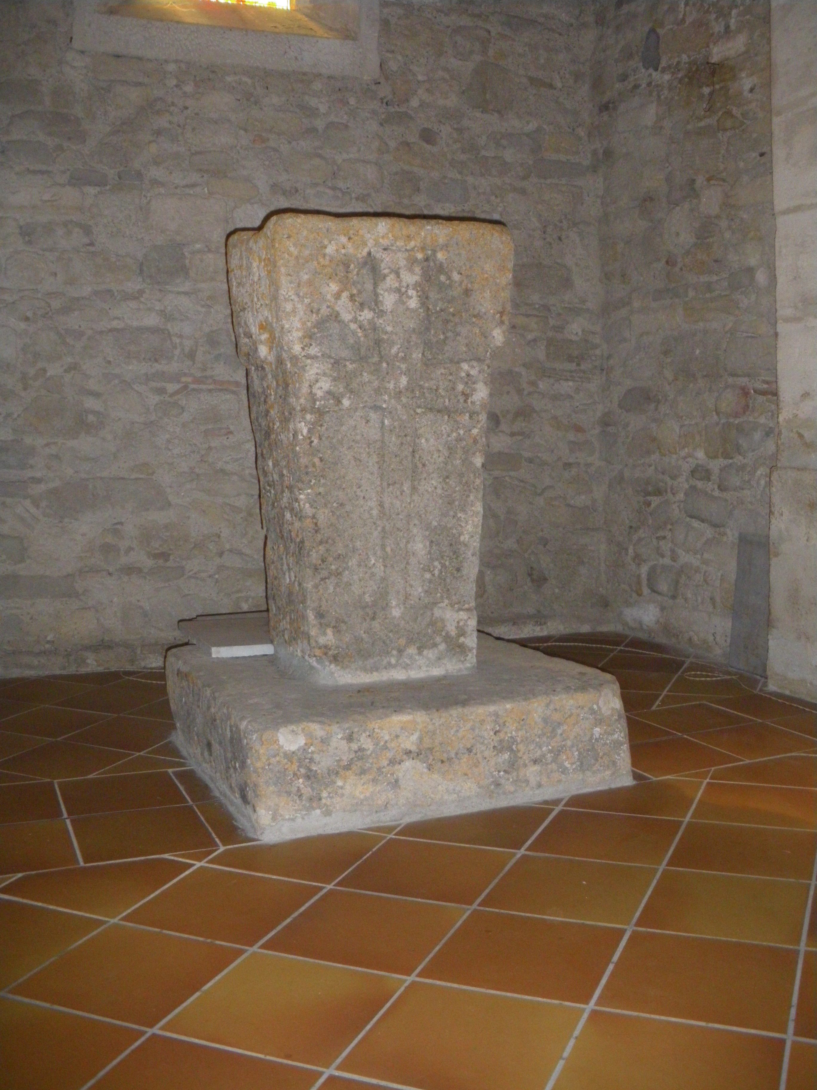 Autel wisigothique, Église Saint-Sylvestre et Sainte Colombe, Colombiers, Hérault, France